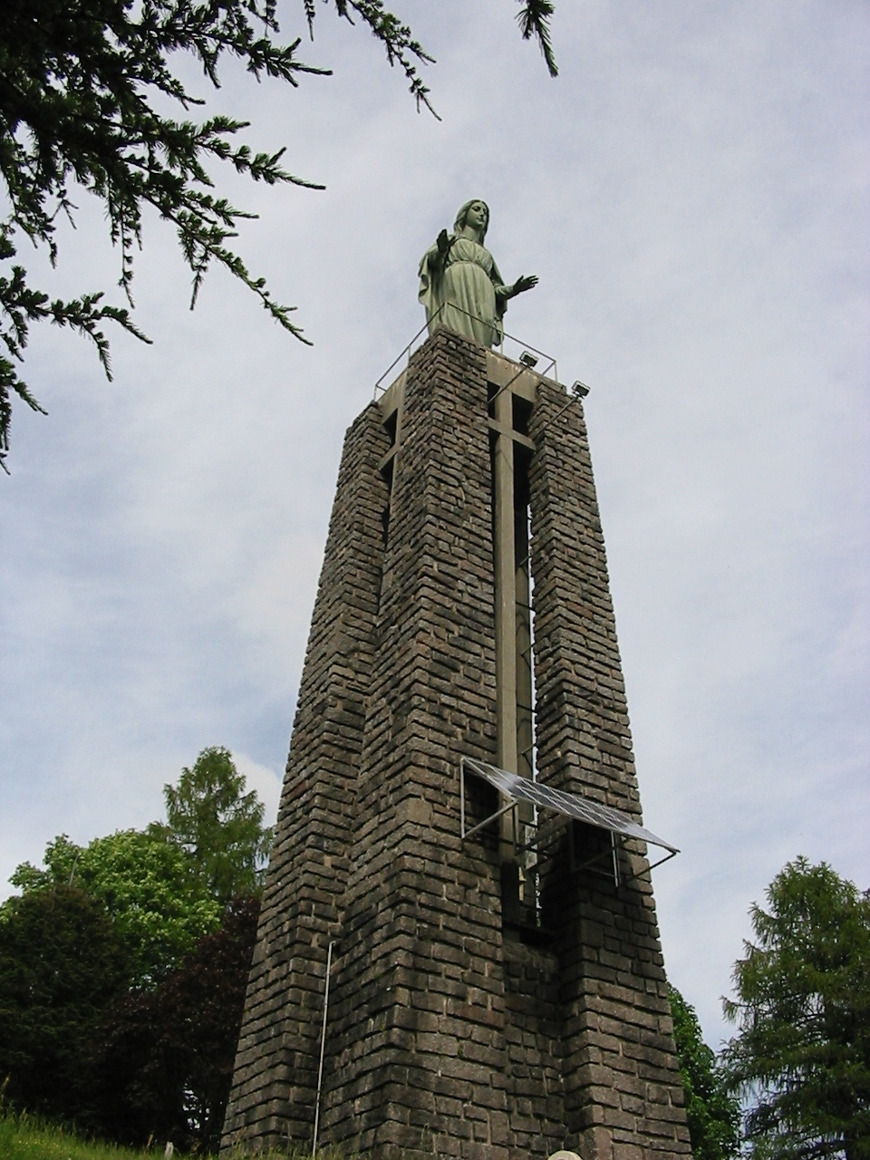 Monument Notre-Dame-de-la-Paix à Cornimont (Vosges).